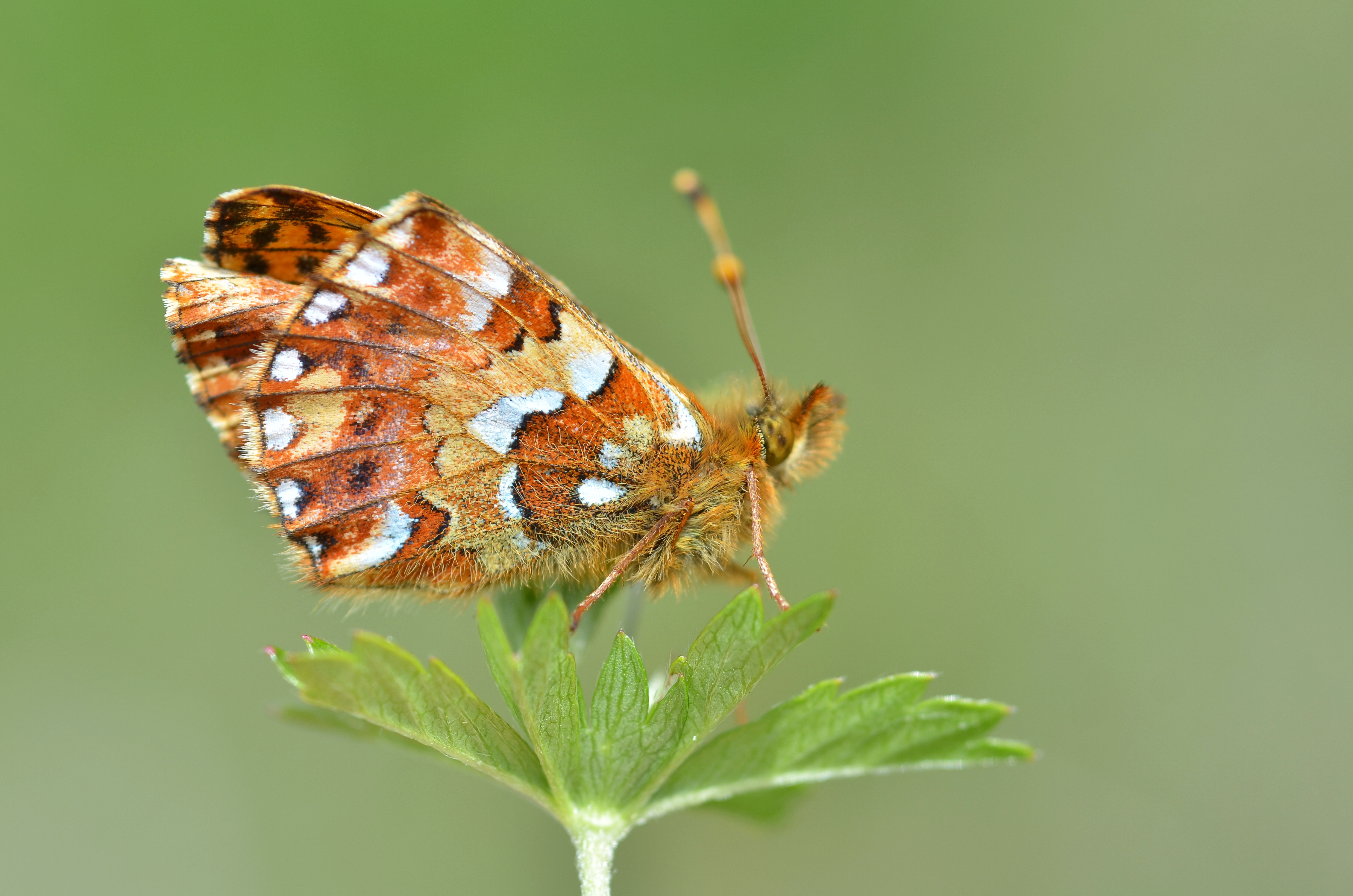 Boloria aquilonaris